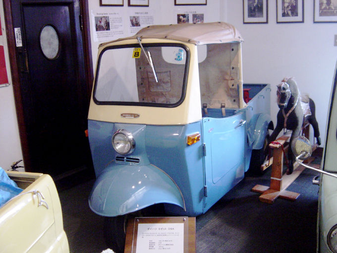 DAIHATSU-MIDGET-DA5(ダイハツ),Fukuyama MOTOR and CLOCK MUSEUM